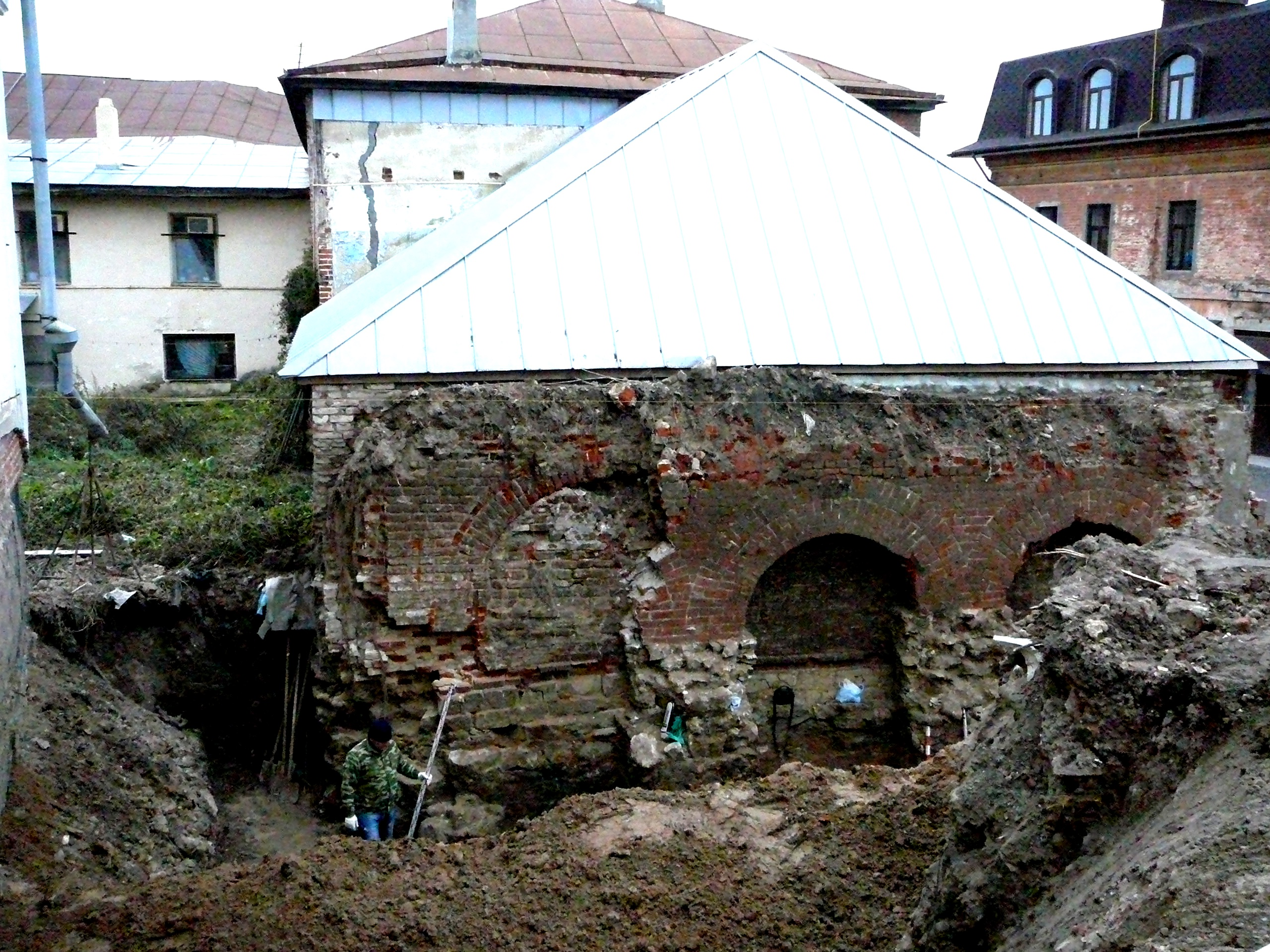 Бывшая церковь Косьмы и Дамиана (г. Казань, 2013 года)